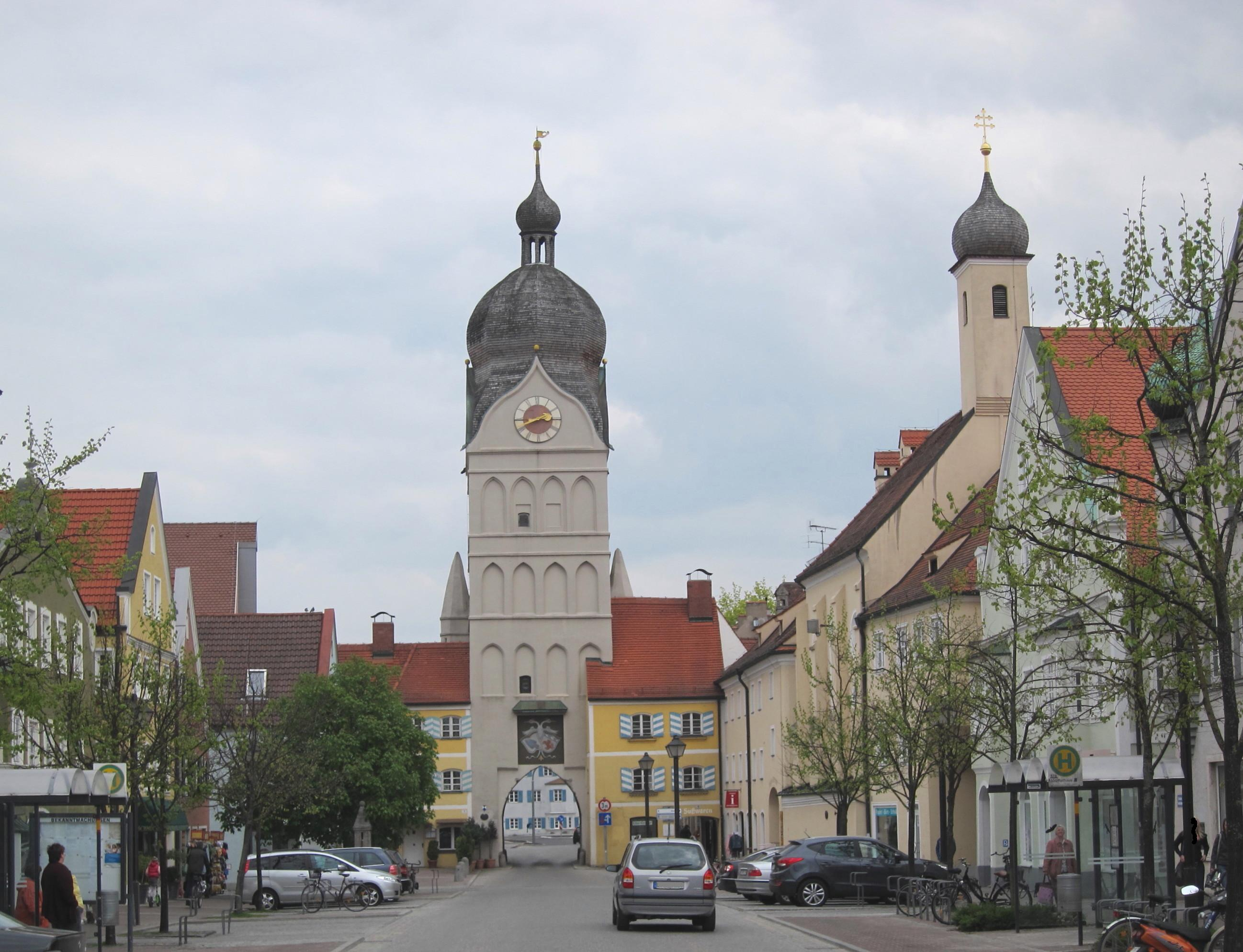 Erding, Landshuter Straße und "Schönes Tor" (östliches Stadttor, sog. Landshuter Tor, Backsteinbau des 15. Jh. mit Haubenkuppel von 1660/64 und dreigeschossigem Torhaus, 17. Jh.;)